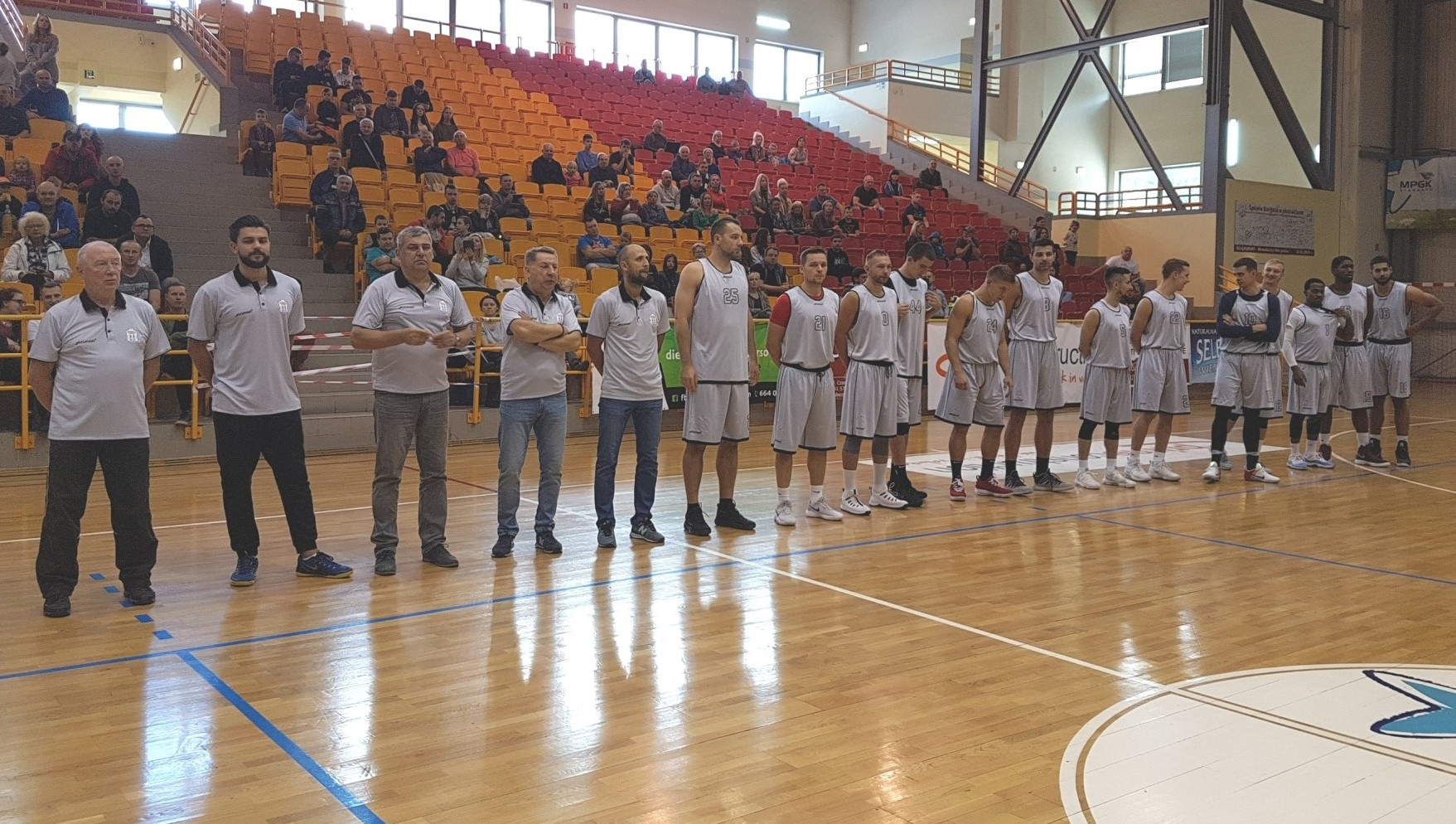 Spójnia Stargard (29.09.2018)